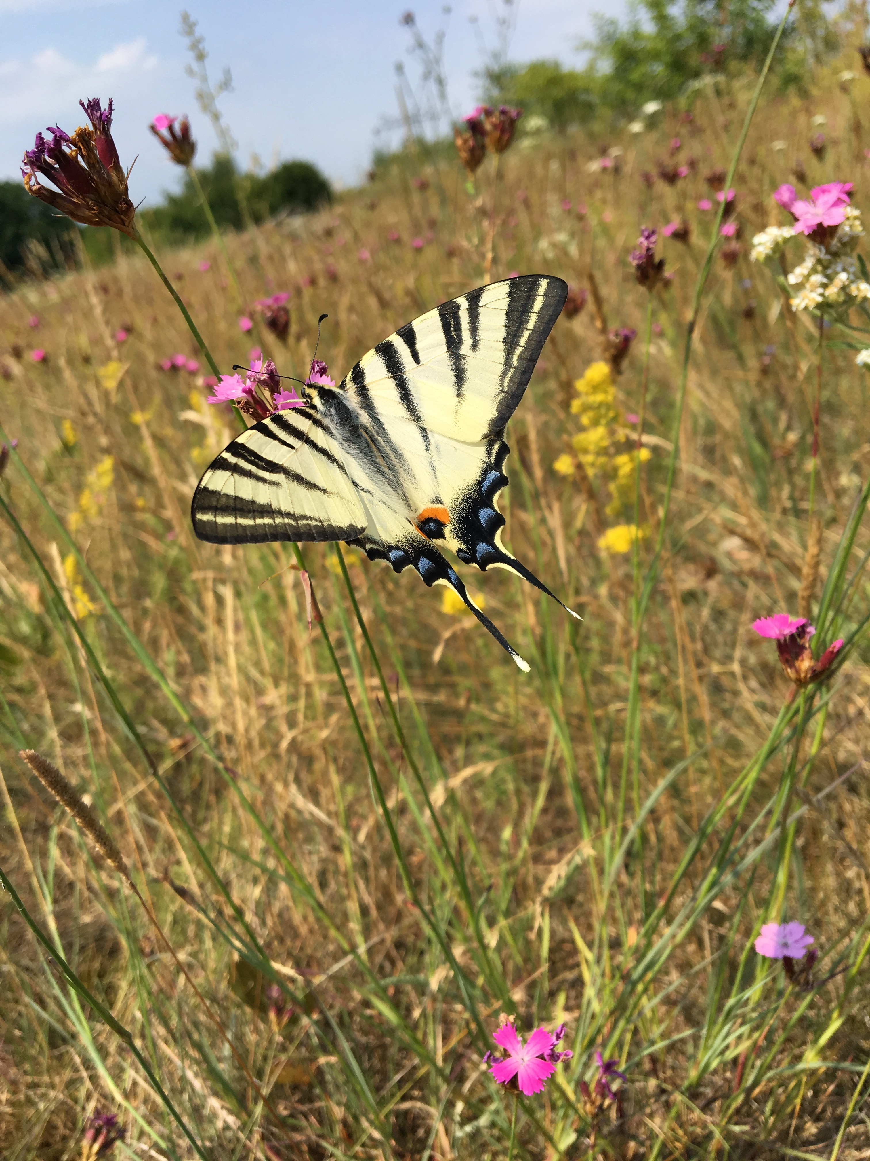 weiblicher Falter bei der Nahrungsaufnahme, 05.07.2018 in Frankfurt (Oder)-Markendorf